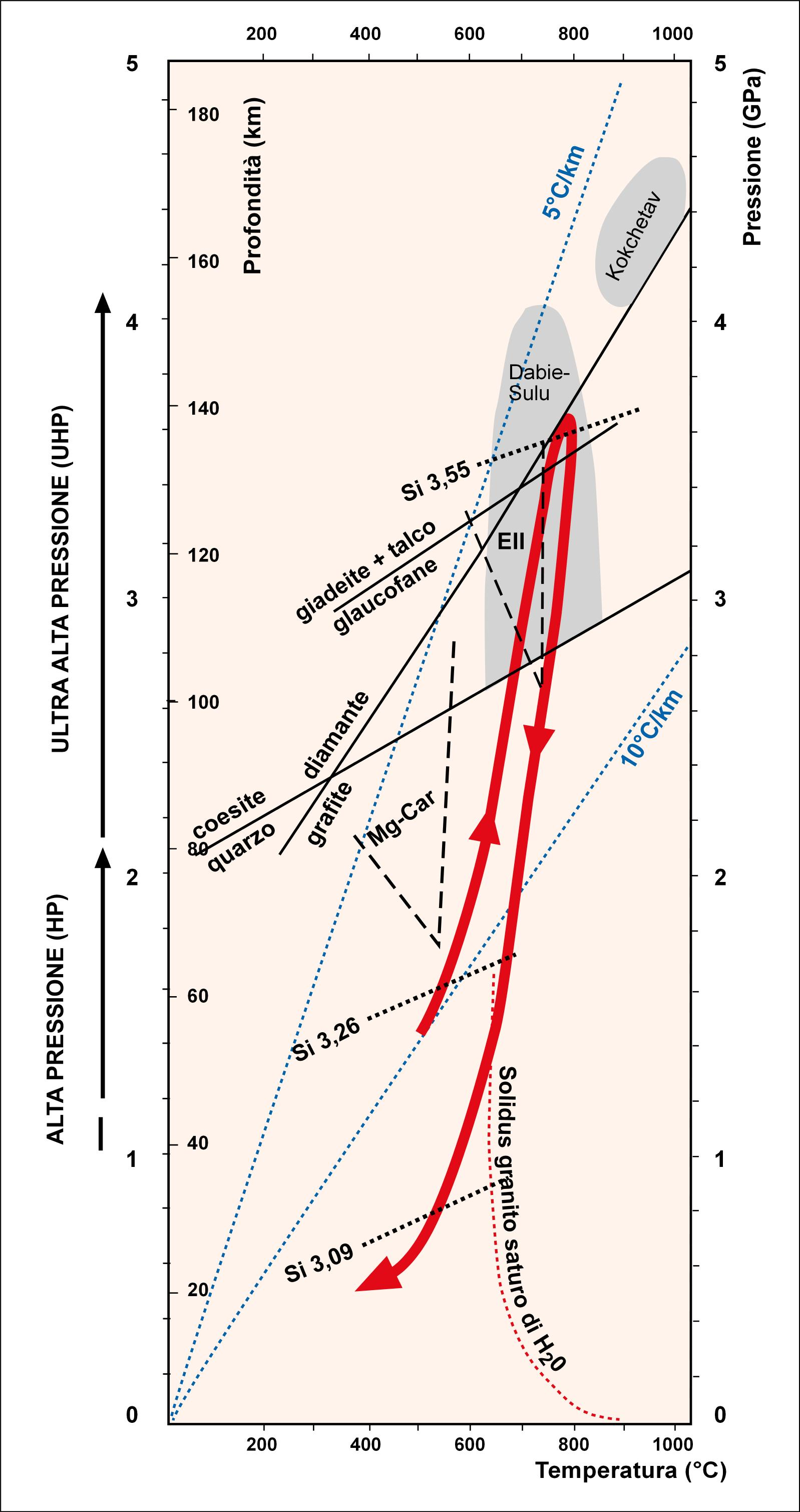 Ambienti P-T del metamorfismo di alta- e ultra-alta pressione. La linea rossa indica il percorso P-T seguito dalle rocce del Massiccio Dora-Maira